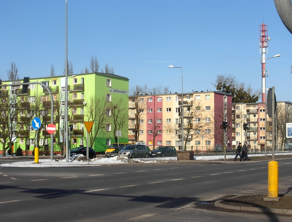 Zabudowa na osiedlu Błonie w Bydgoszczy